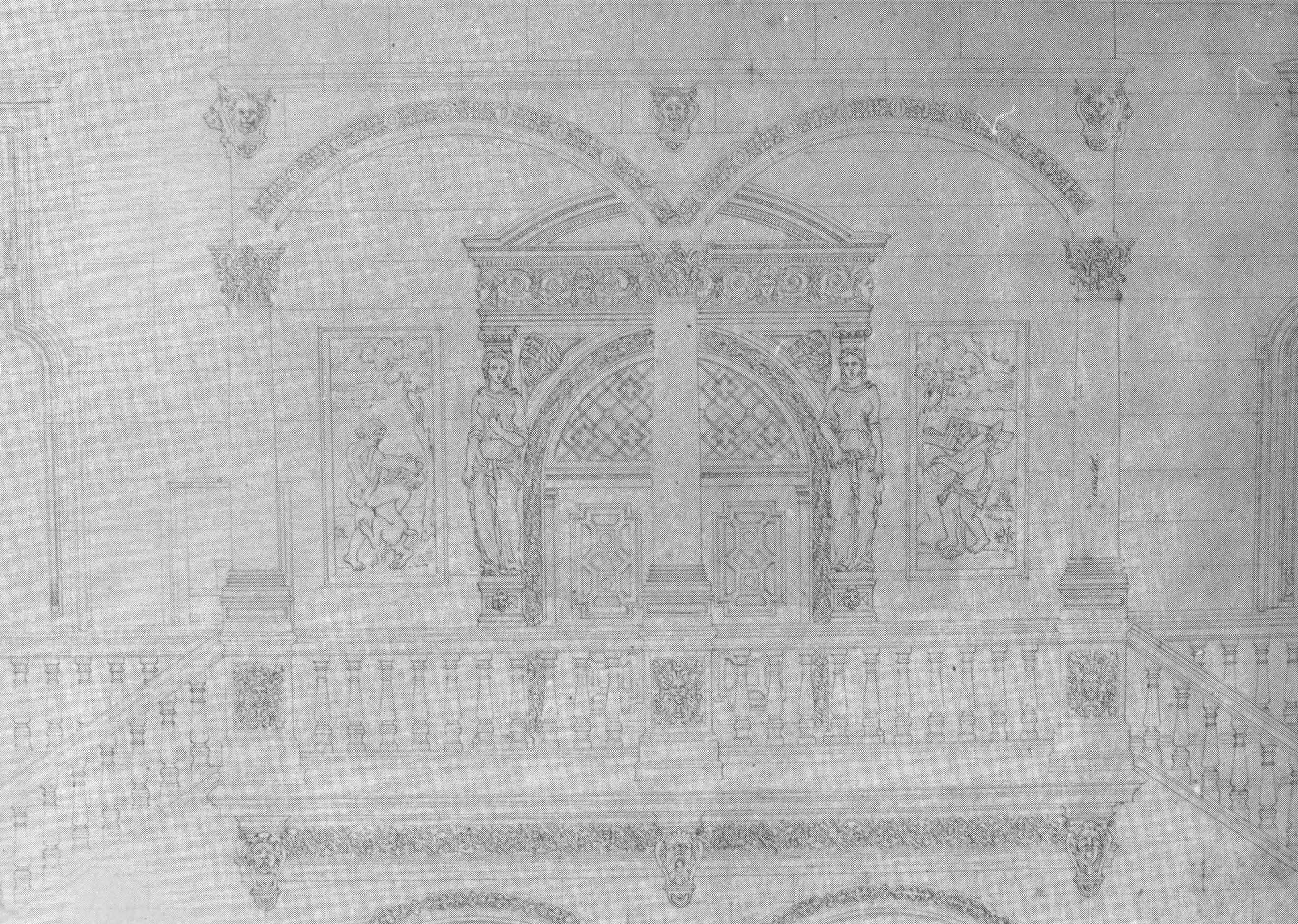 Carl Beisbarth: Rekonstruktion des Treppenpodests mit Saaleingang des Neuen Lusthauses in Stuttgart, Zeichnung, Stuttgart, Universitätsbiliothek, Beisbarth Abt. I, No. 146, Bl. 98.